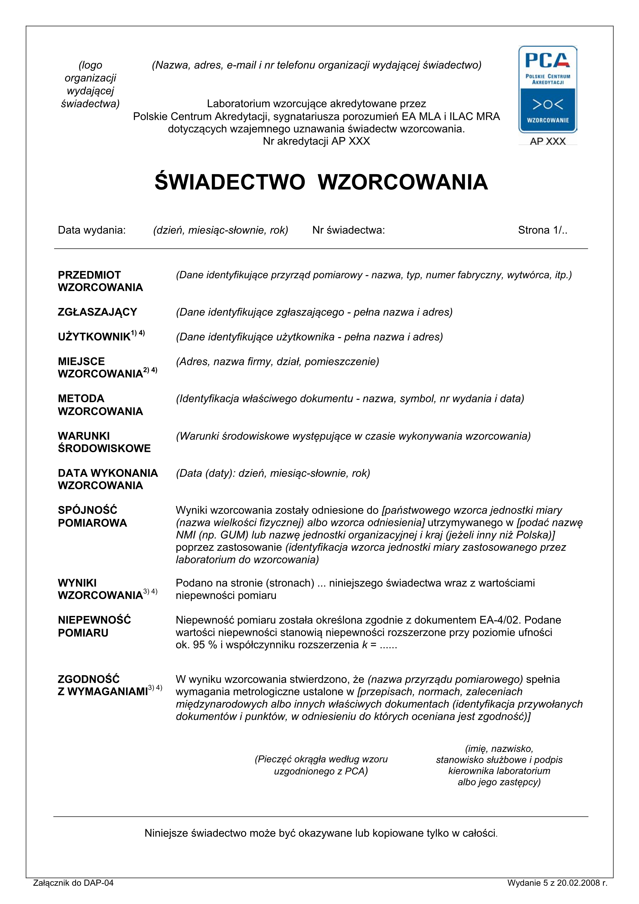 Wzór świadectwa wzorcowania Polskiego Centrum Akredytacji (PCA), str. 1